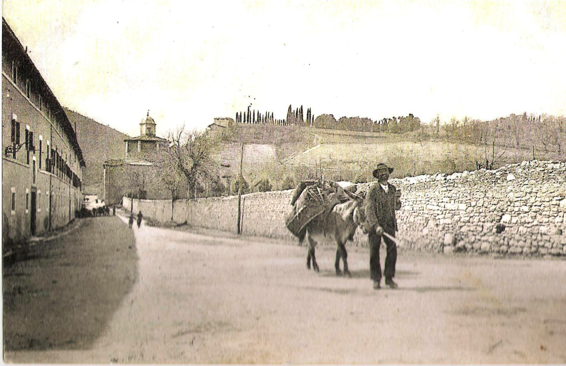 Spoleto via San Carlo, sullo sfondo la Chiesa di San Rocco